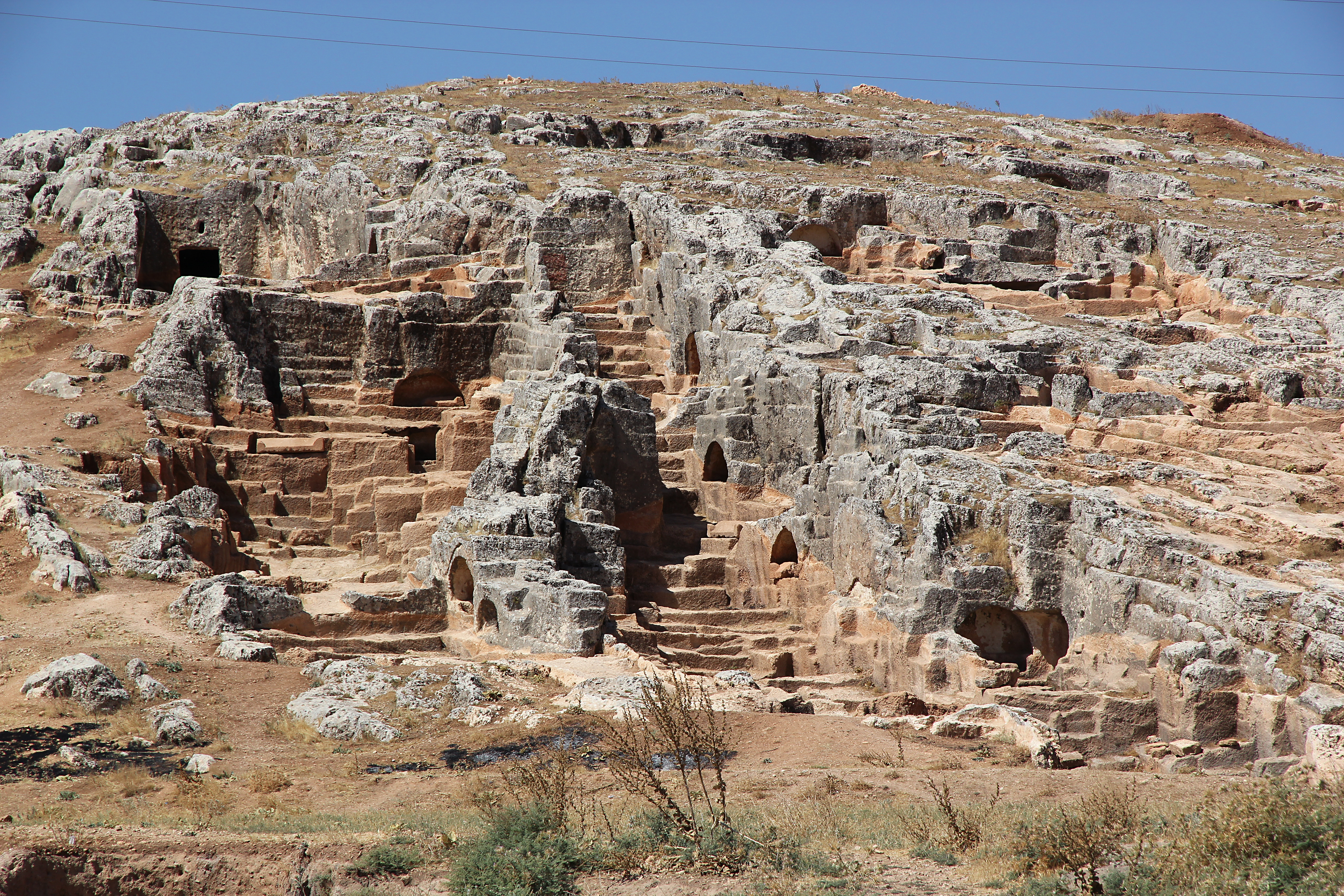 Perrhe, kommagenische Stadt bei Adıyaman, Südtürkei, Nekropole